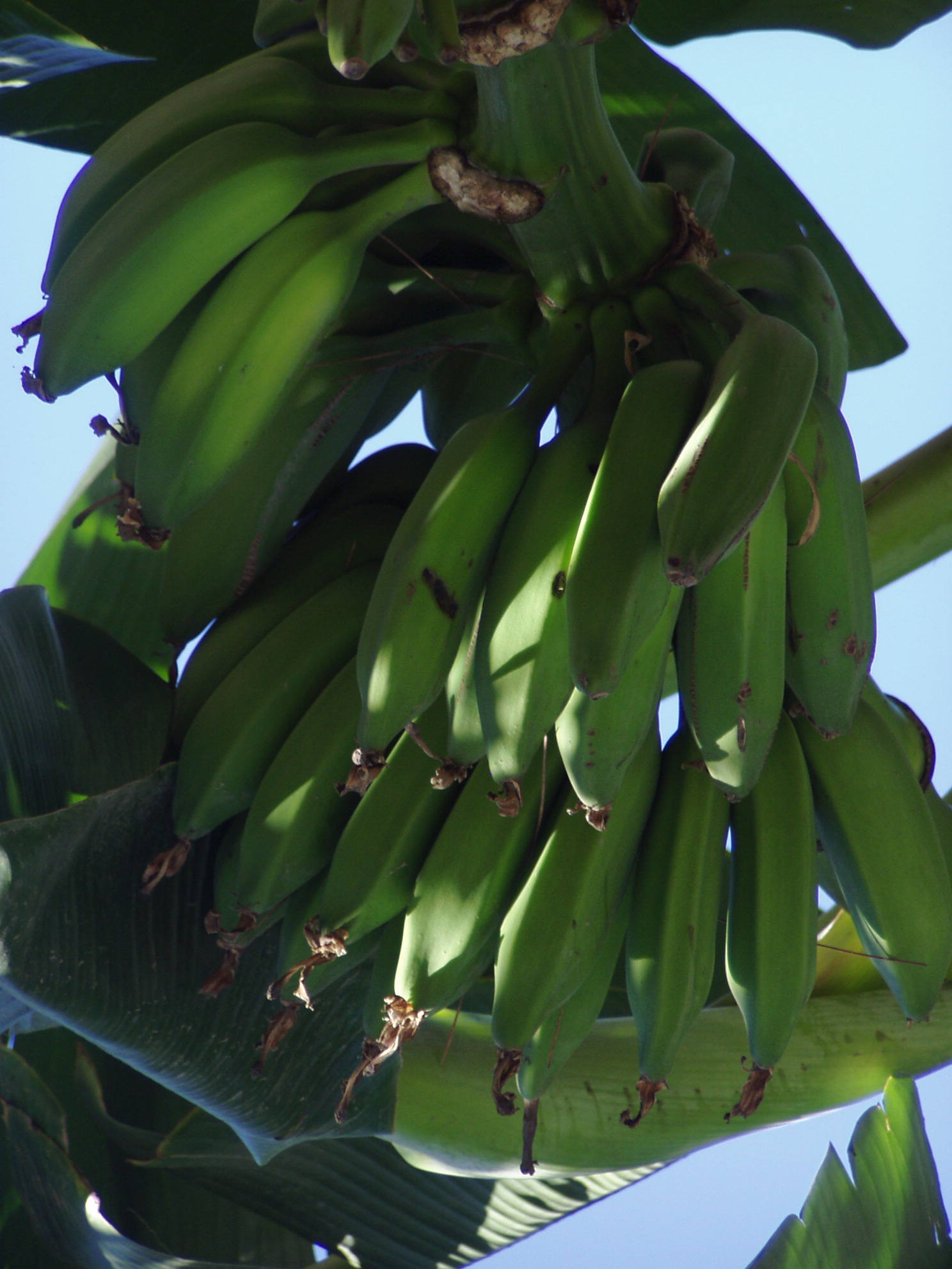 Banano vaisiai ant augalo.